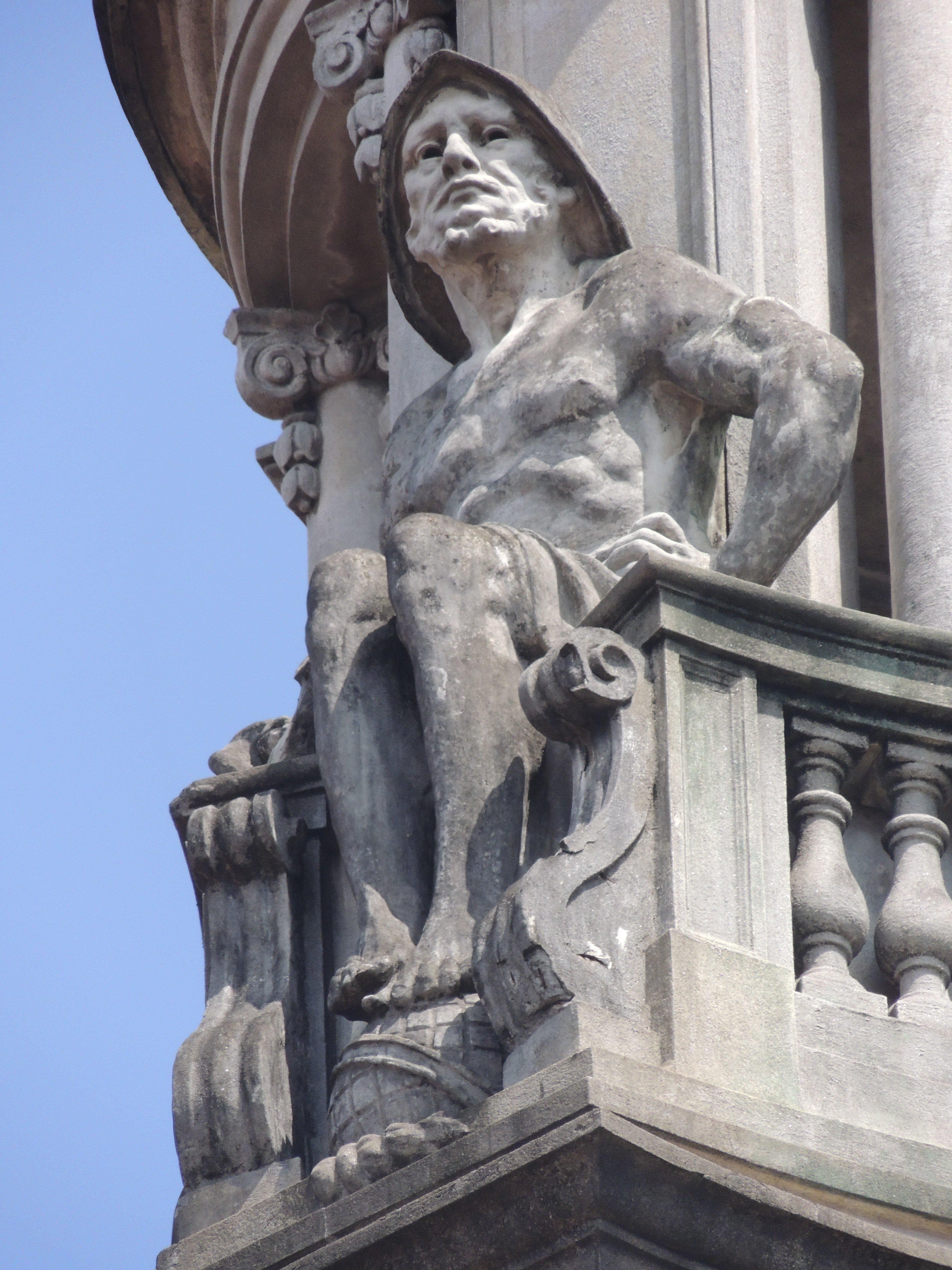 Integra um conjunto de estátuas na torre da Bolsa de Café na cidade de Santos. As estátuas têm cerca de 4,5 m de altura e são feitas em cimento. Moldadas por Van Emelen em seu ateliê no Palácio das Indústrias, São Paulo, em 1922, as estátuas teriam sido inauguradas só em 1923 depois da inauguração da Bolsa, pois a torre ainda estava em construção.